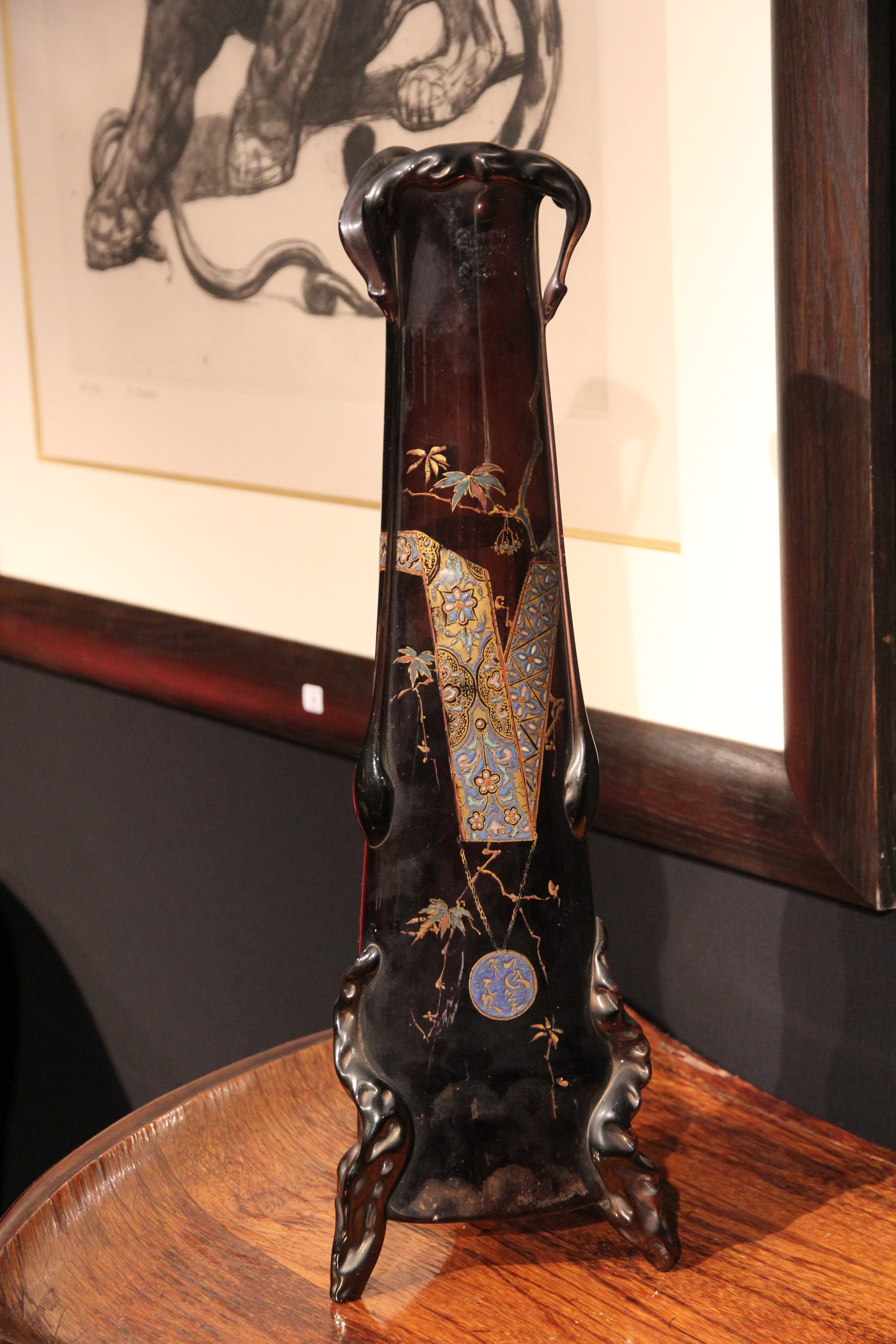 Vase (d'une paire) d'Auguste Jean. Verre. Réalisé entre 1877 et 1884, Paris. Collection privée.